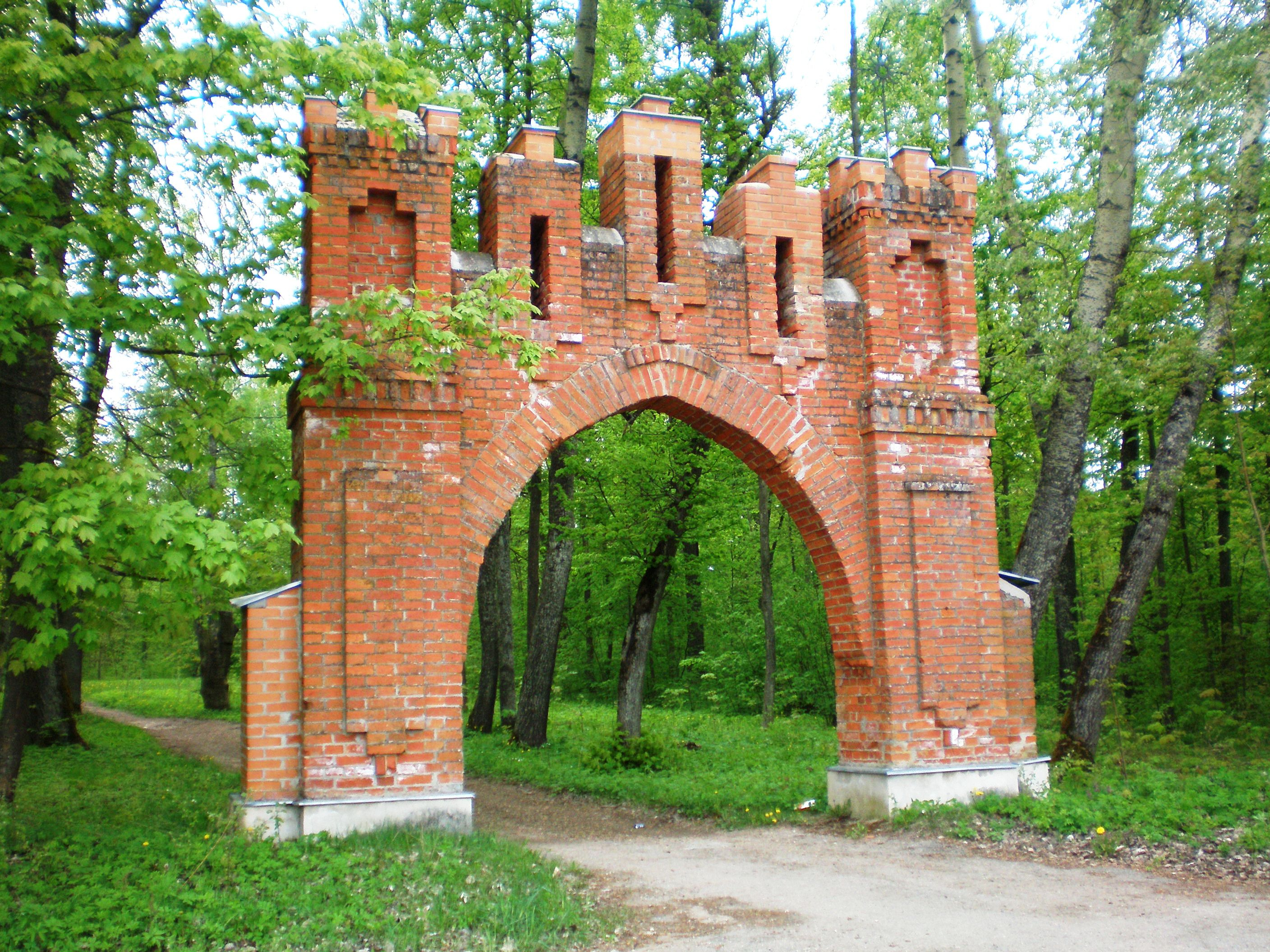 Arka, Pašušvys, Krakių sen., Kėdainių raj.